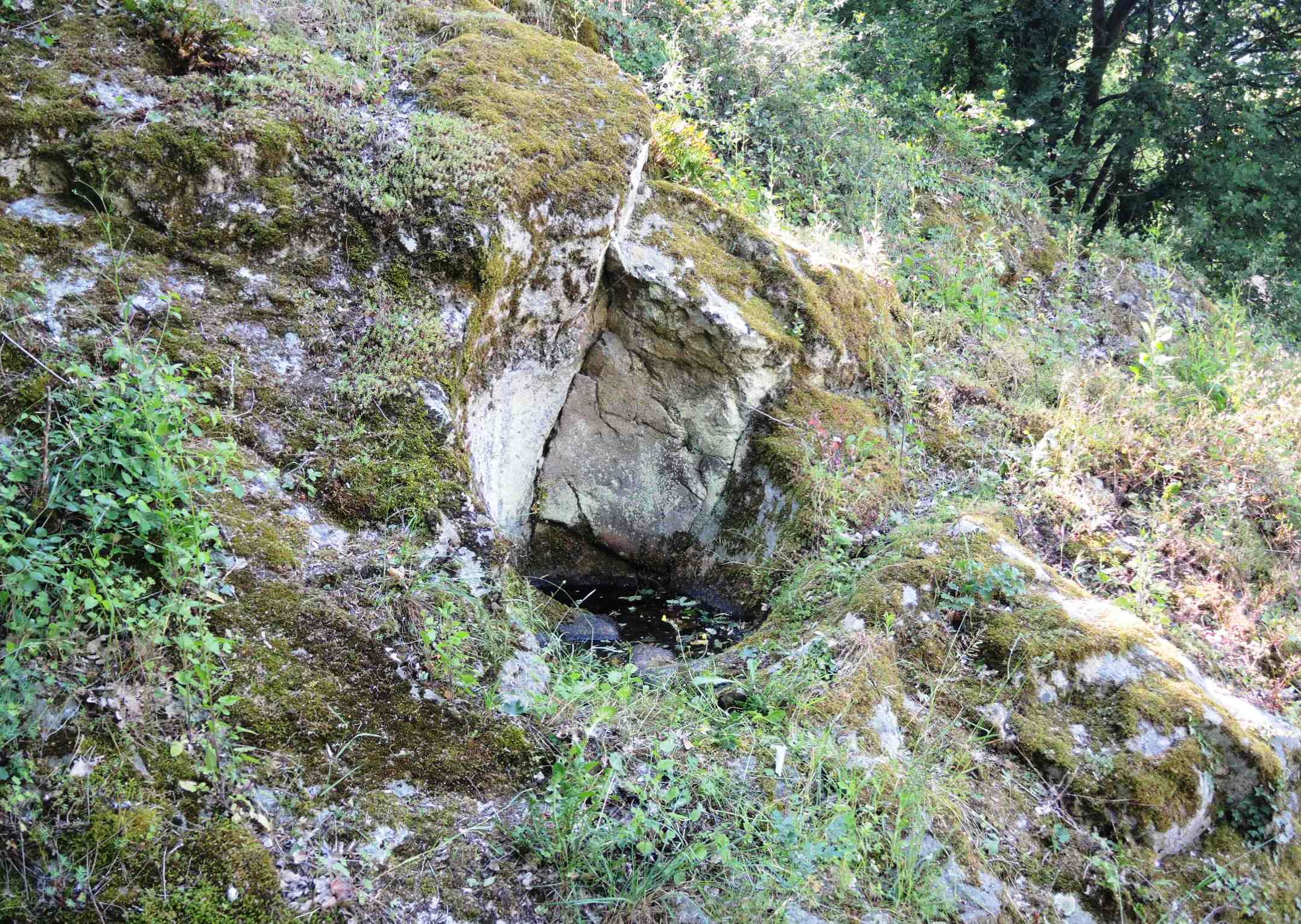 Peyraud détail